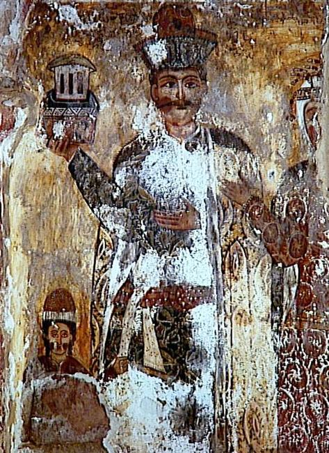 Eglise du Saint-Sauveur, chapelle n° 3, mur sud : le donateur.